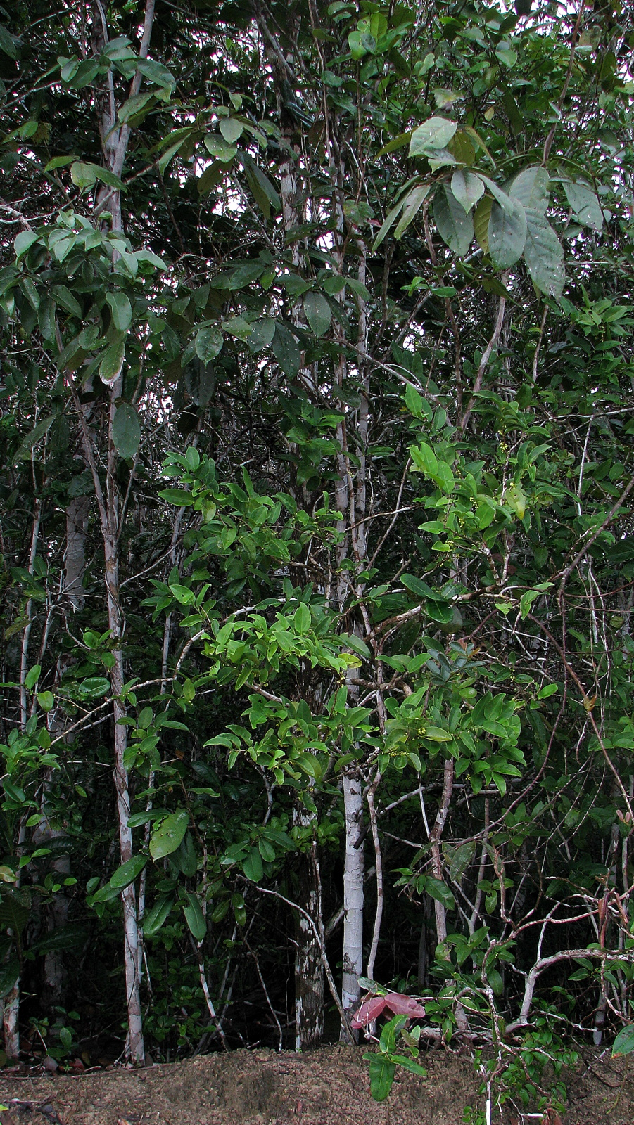 Schoepfia brasiliensis A. DC.